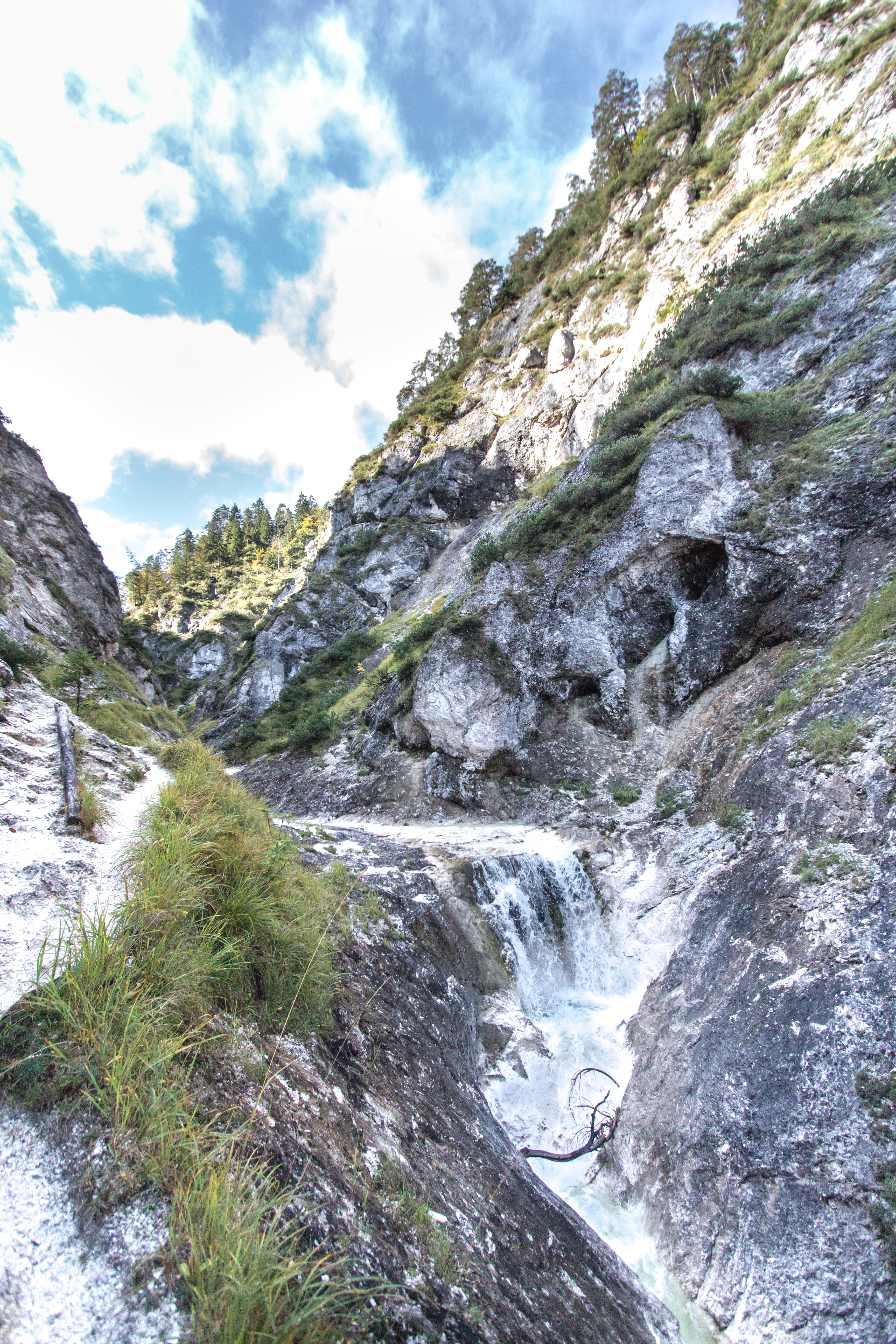 Aschauer Klamm